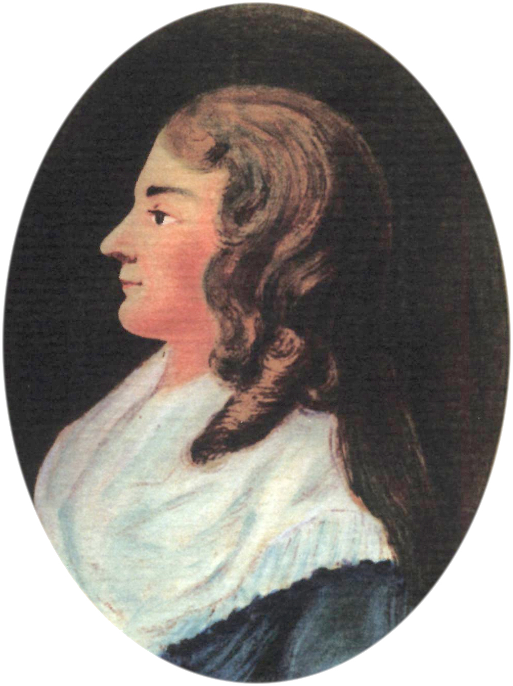 Zeitgenössisches Portrait von Dorothea Christiane Erxleben (* 13. November 1715; † 13. Juni 1762).